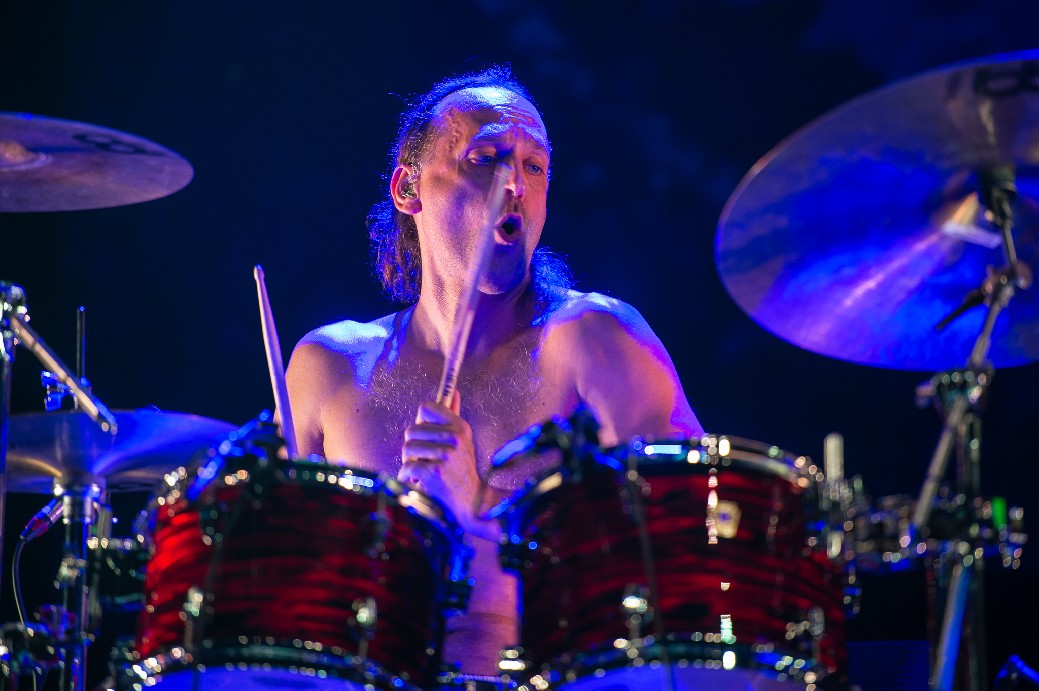 ARGO-Konzerte,Alternarena,Baroness,Festival,Konzert,Livekonzert,Livemusik,Musik,RiP,Rock im Park 2018,Sebastian Thomson